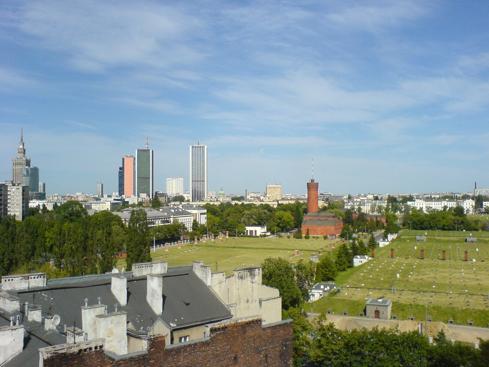 Filtry Lindleya (Warszawa)